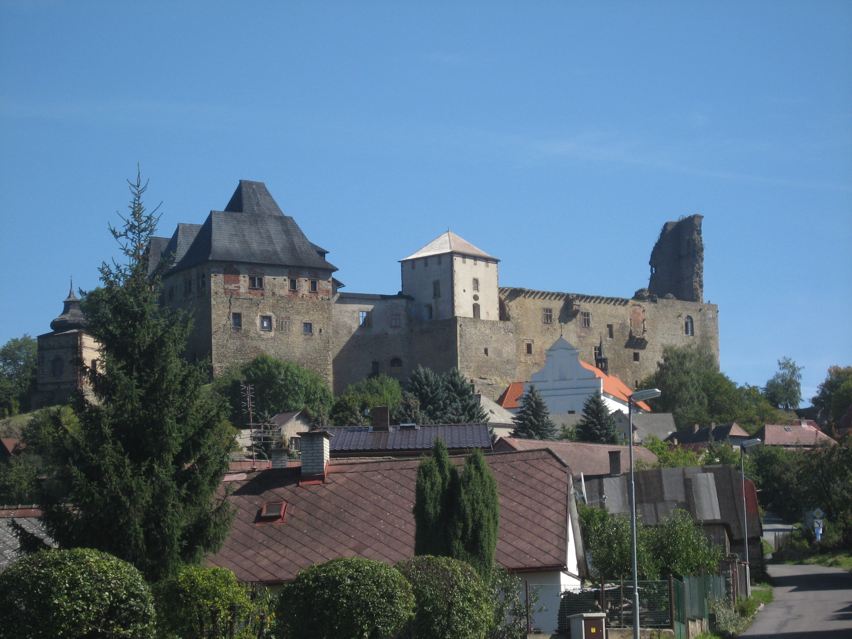 Lipnice nad Sázavou